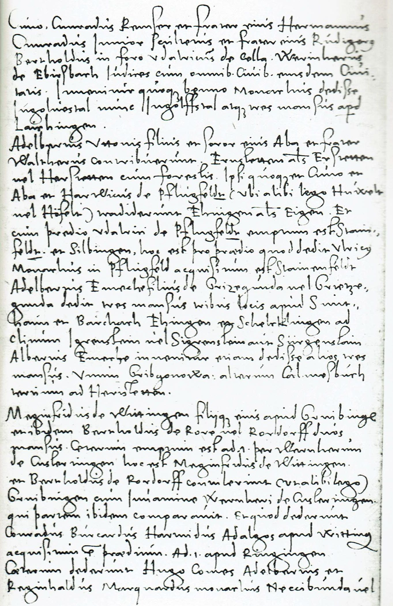 Seite aus der Chronik des Blaubeurer Abts Christian Tubingius. Handschrift Andreas Rüttel des Jüngeren. Hauptstaatsarchiv Stuttgart A 478 Bü 16 ([1])